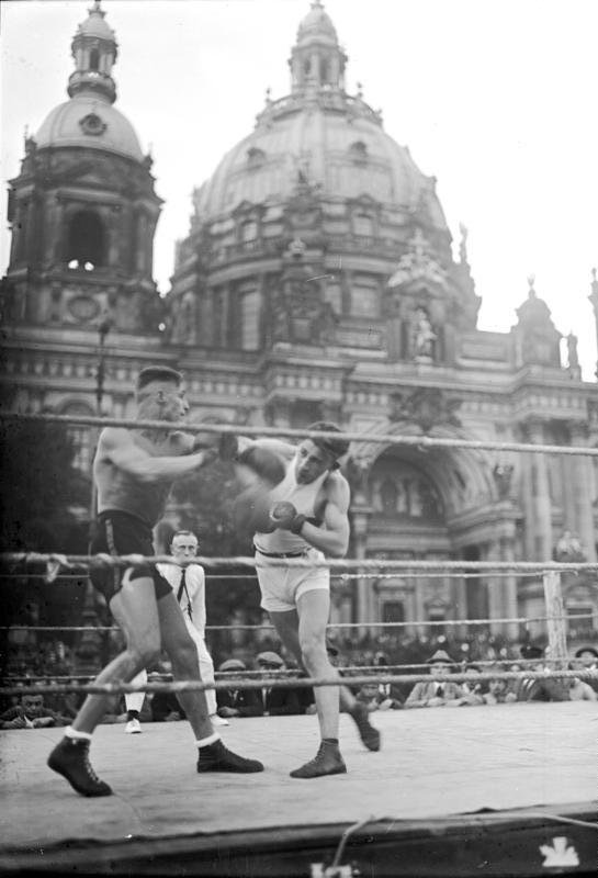 Zur Turn und Sportwoche Jiu-Jitsu und Boxkämpfe im Lustgarten in Berlin. Boxkampf im Lustgarten. Im Hintergrund der Dom.